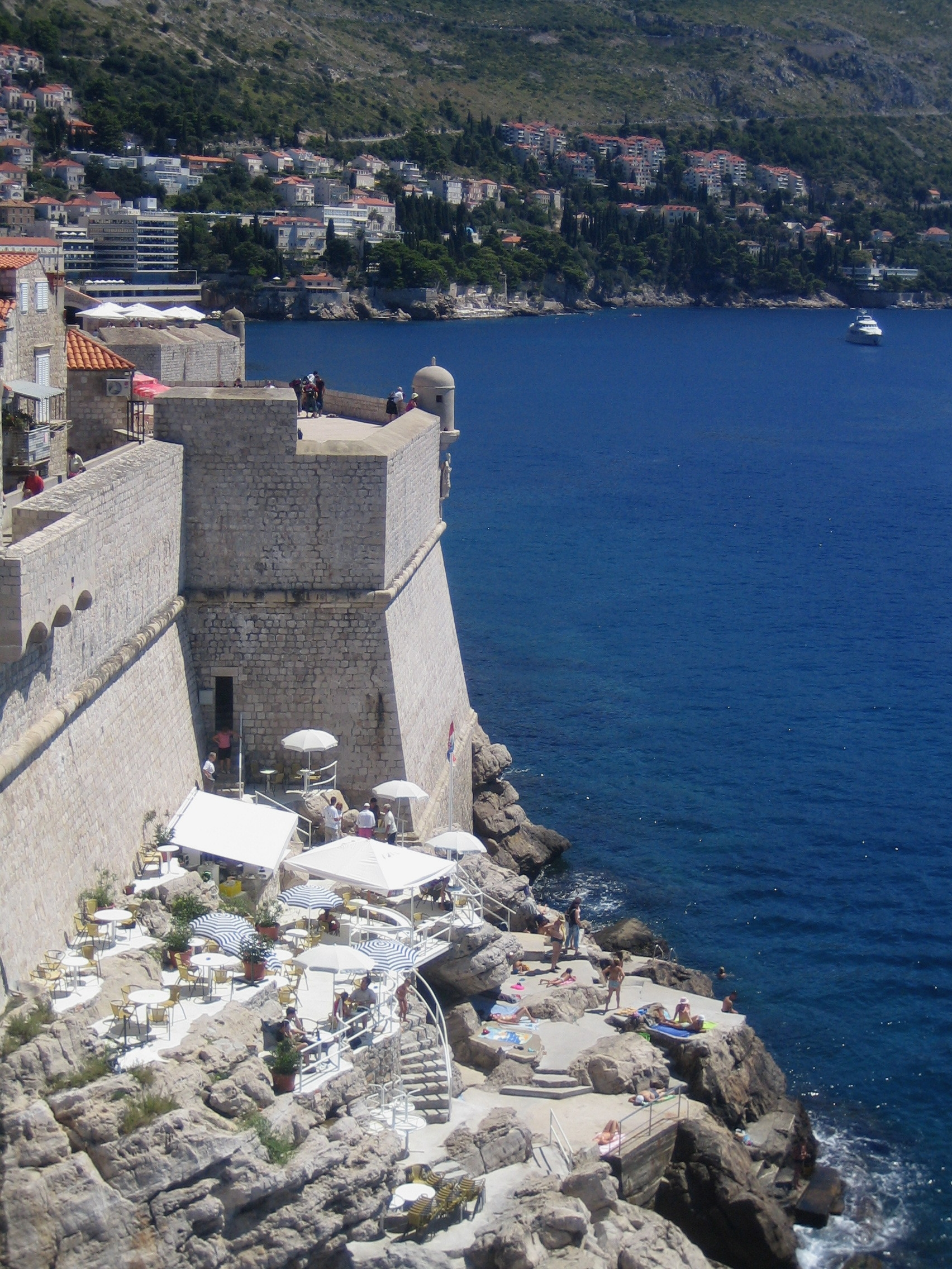 Cafetería en la muralla de Dubrovnick. Croacia